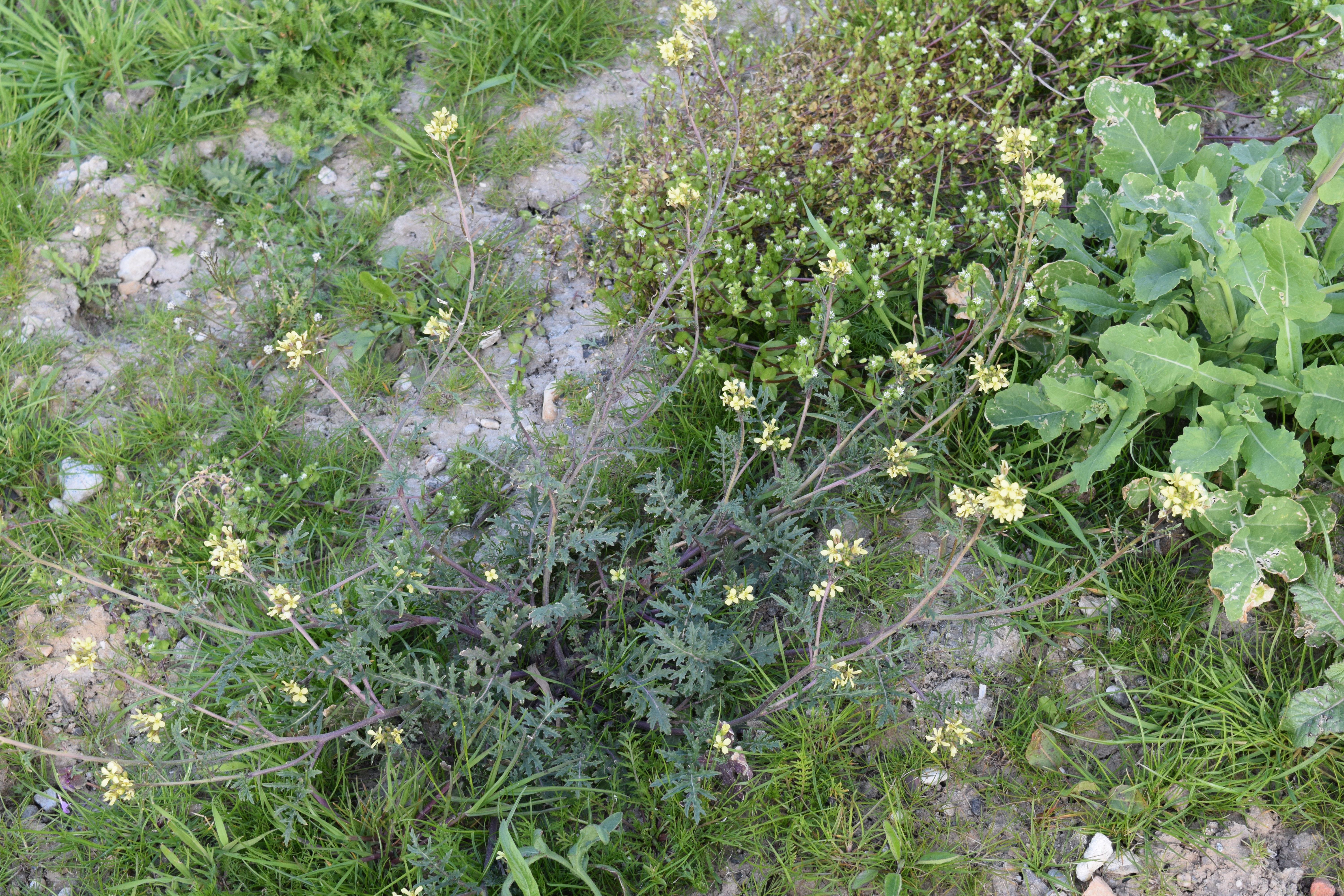 Schijnraket, Erucastrum gallicum